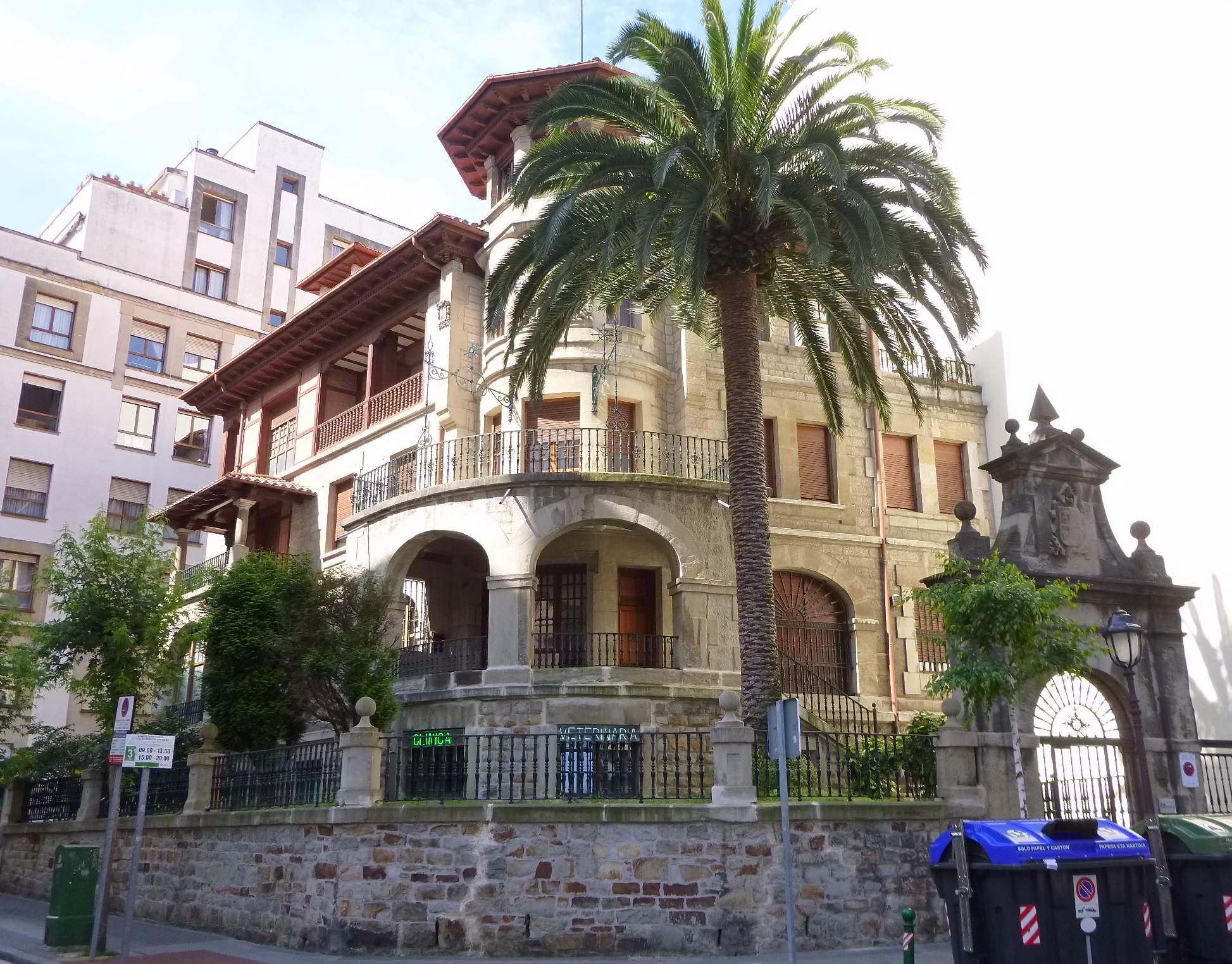 Casa Arróspide (Bilbao)